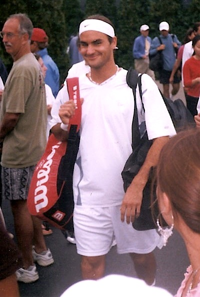 Roger Federer Smiles At The 2002 U.S. Open (a clearer version of Image:Roger_federer_2002.jpg)